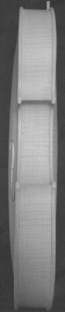 Violinie mit Sicht auf die Zargen (Unterbugzarge, Mittelbugzarge, Oberbugzarge)